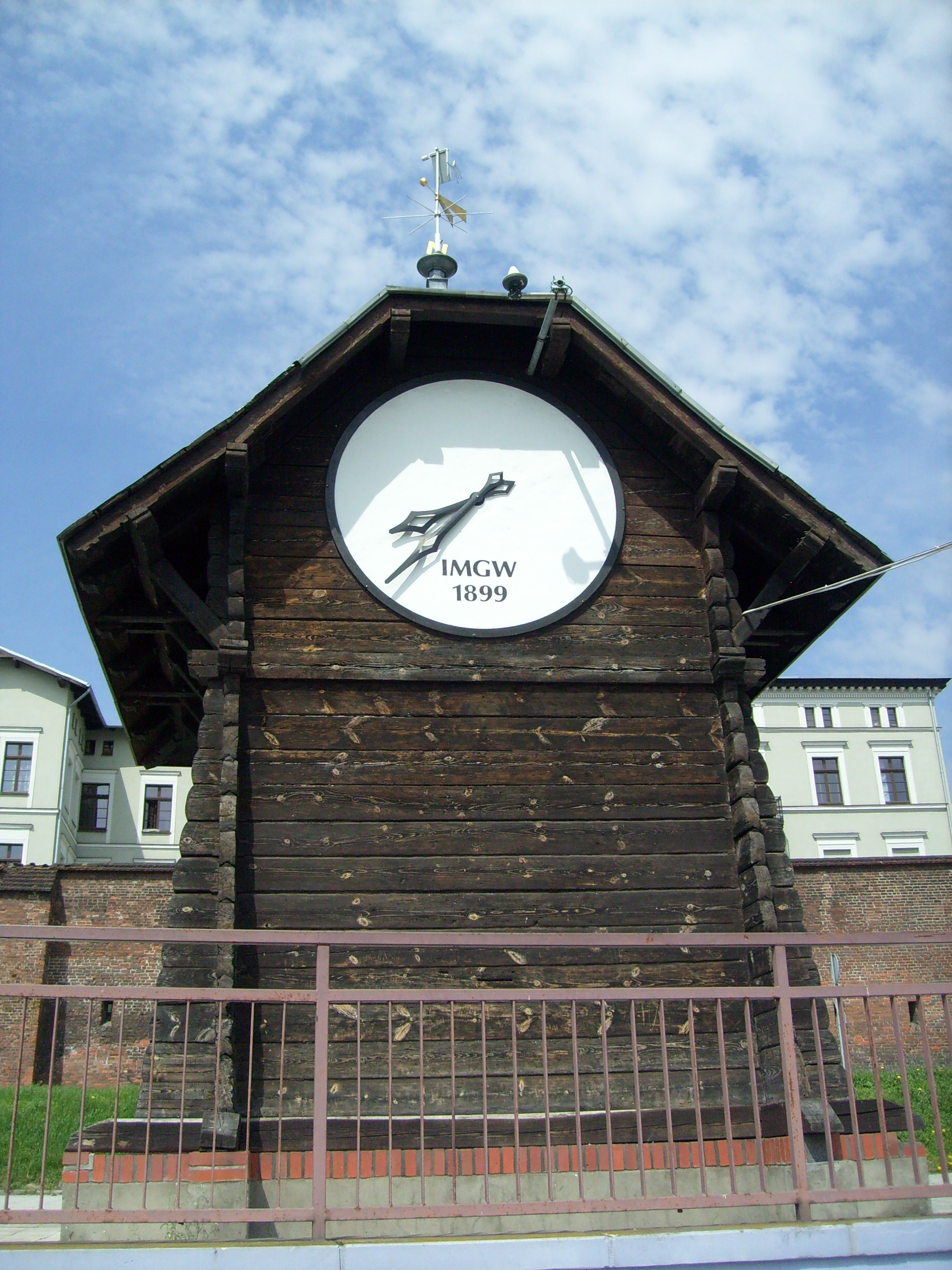 Toruń Bulwar Filadelfijski - limnigraf